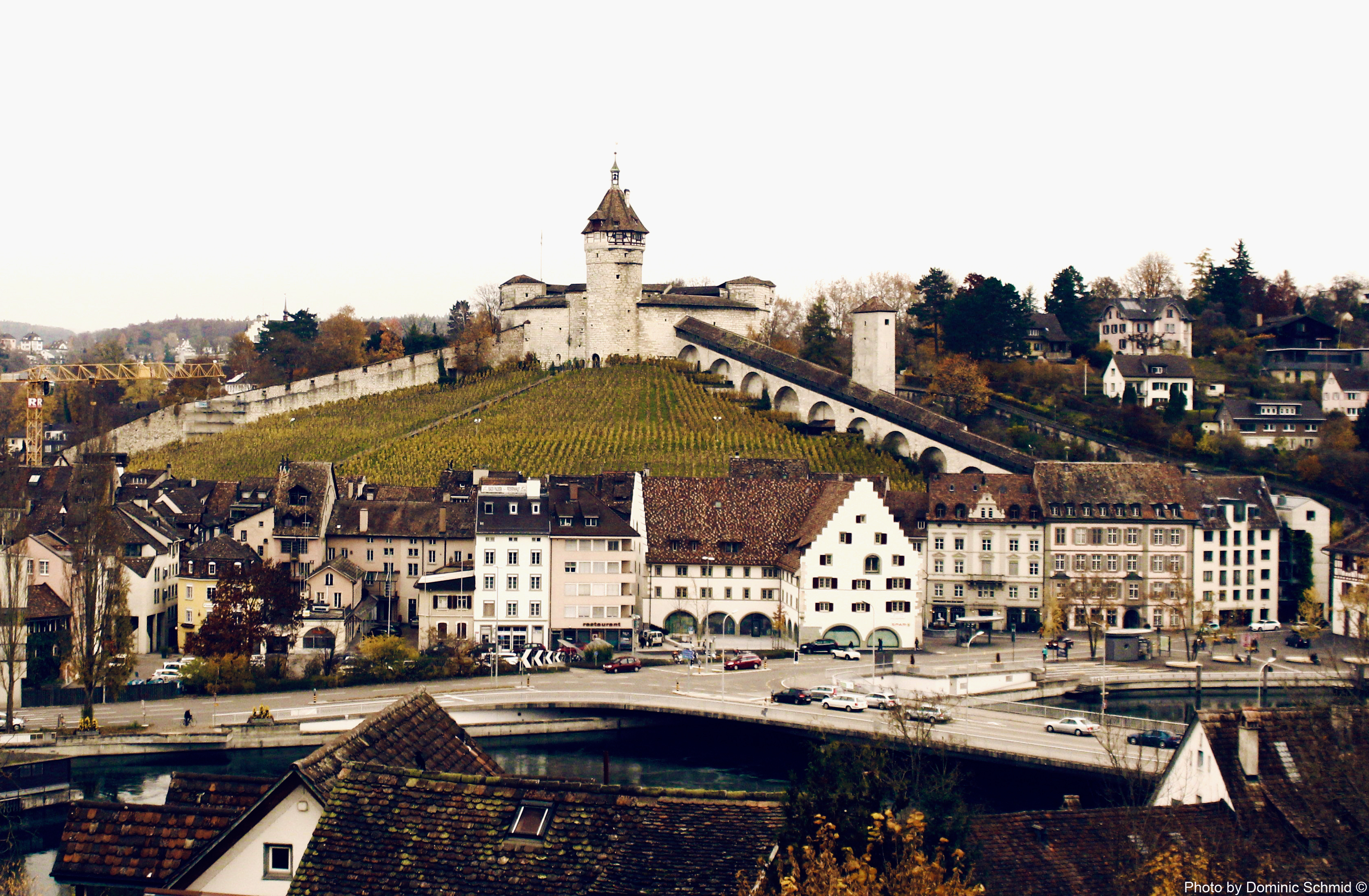 Munot Schaffhausen